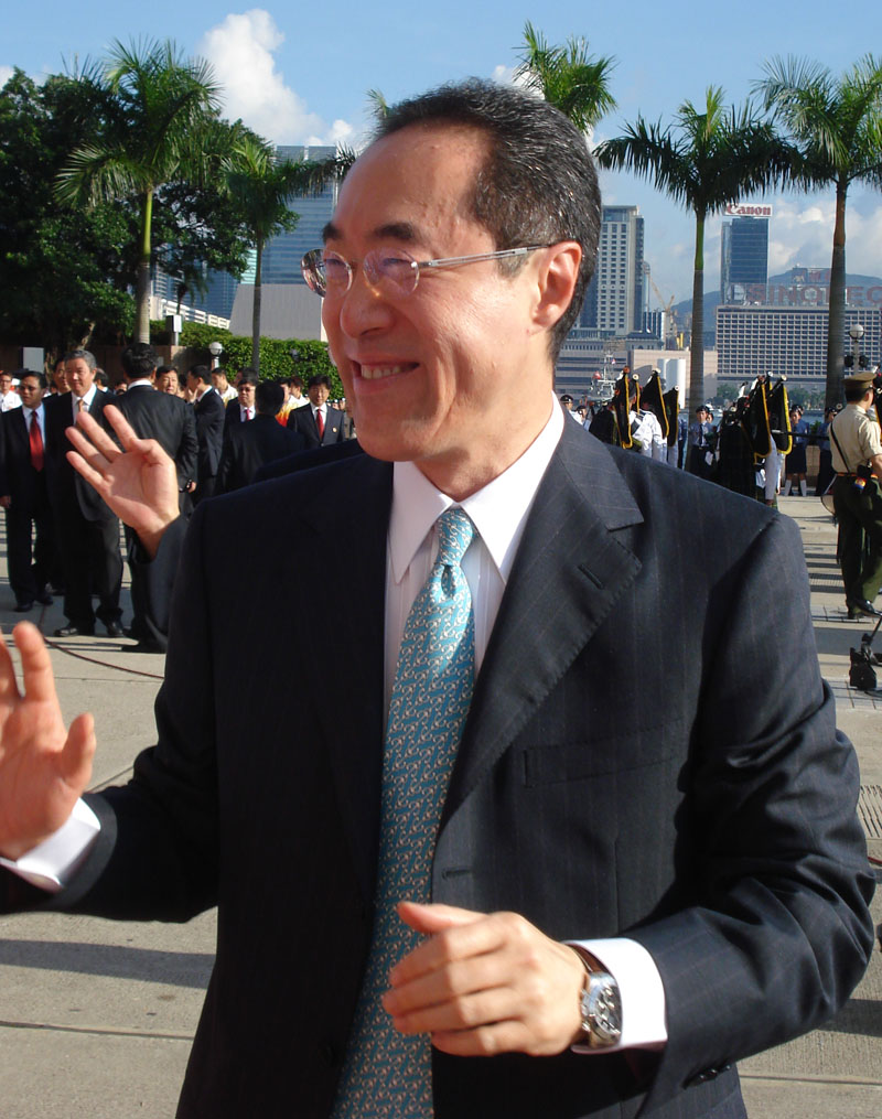 Henry Tang Ying Yen(唐英年)